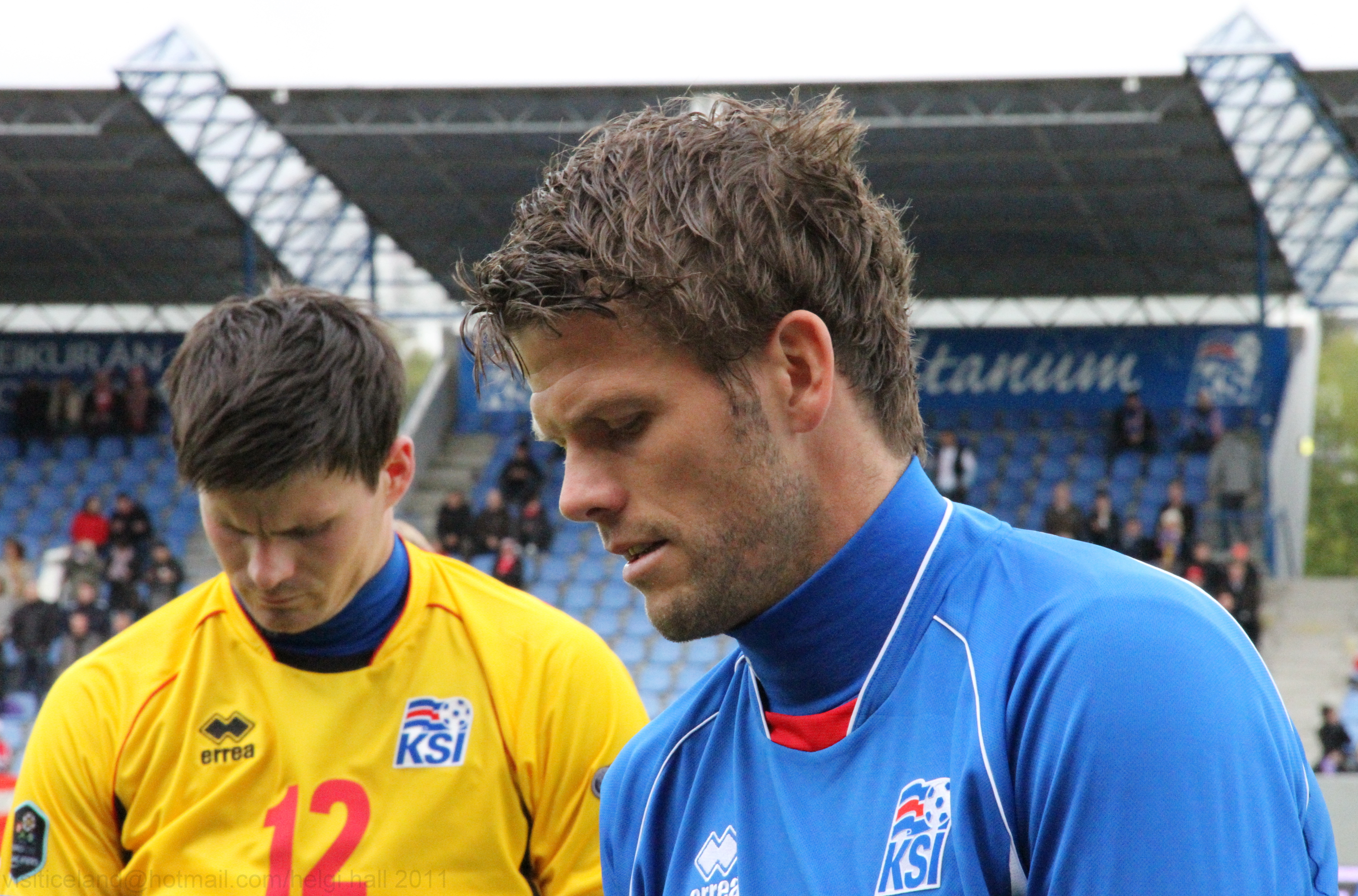 Iceland vs Denmark 4.6.2011